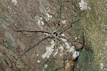 male Heteropoda venatoria from Okinawa.